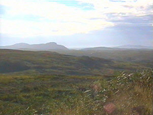 Paysage des Highlands, en Ecosse